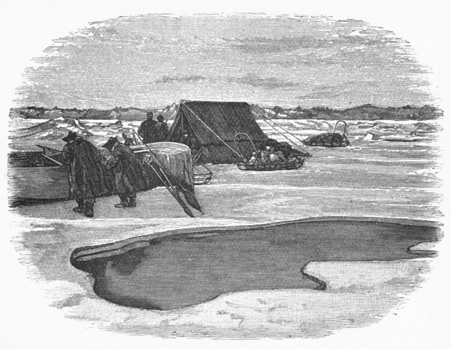 Лагерь, разбитый участниками гренландской экспедиции Нансена на дрейфующей льдине.